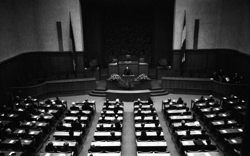 CDU-Bundesparteitag in Düsseldorf